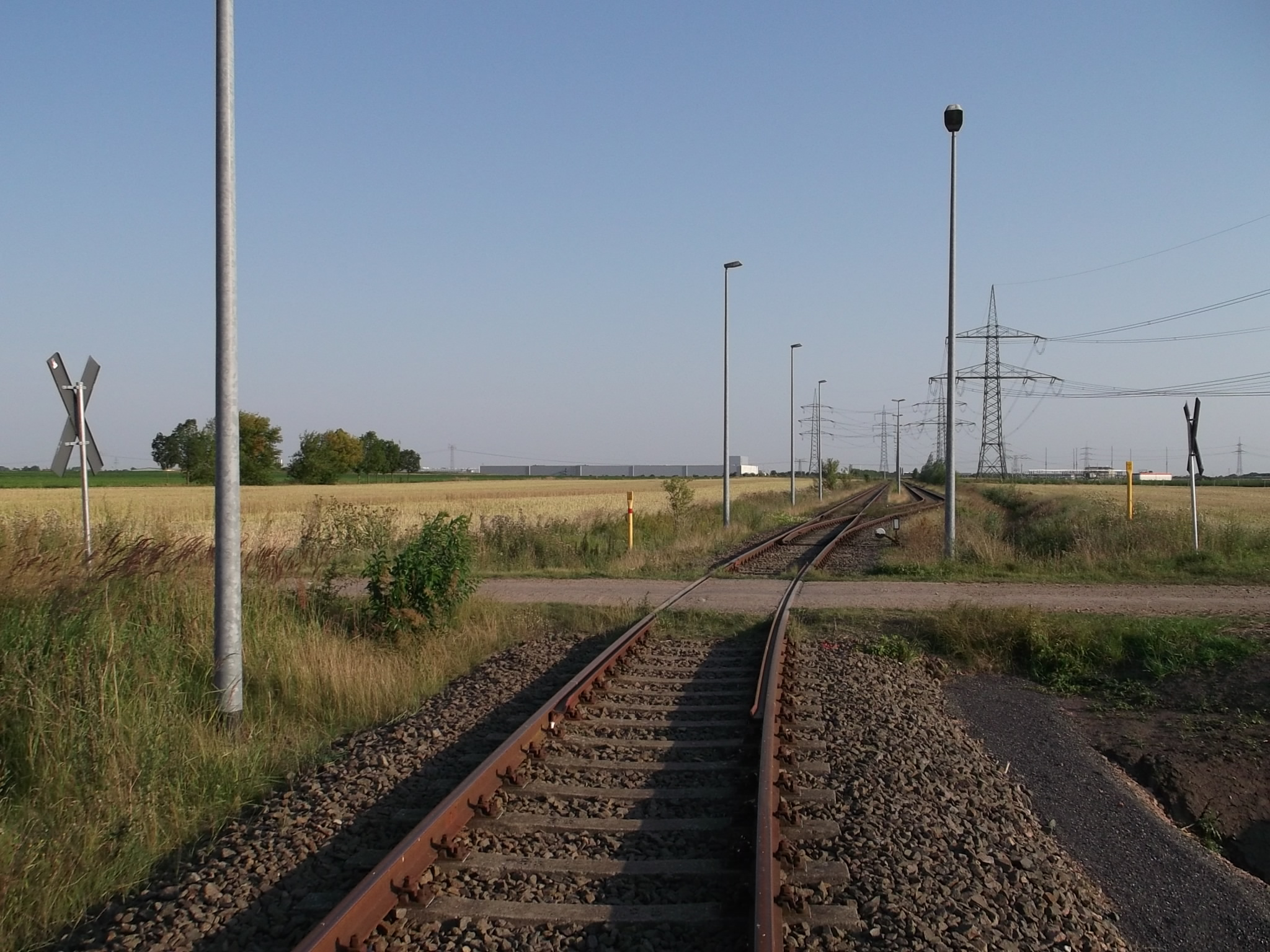 Industriebahn Halle-Queis; Bahnübergang eines Feldweges am km 0,891